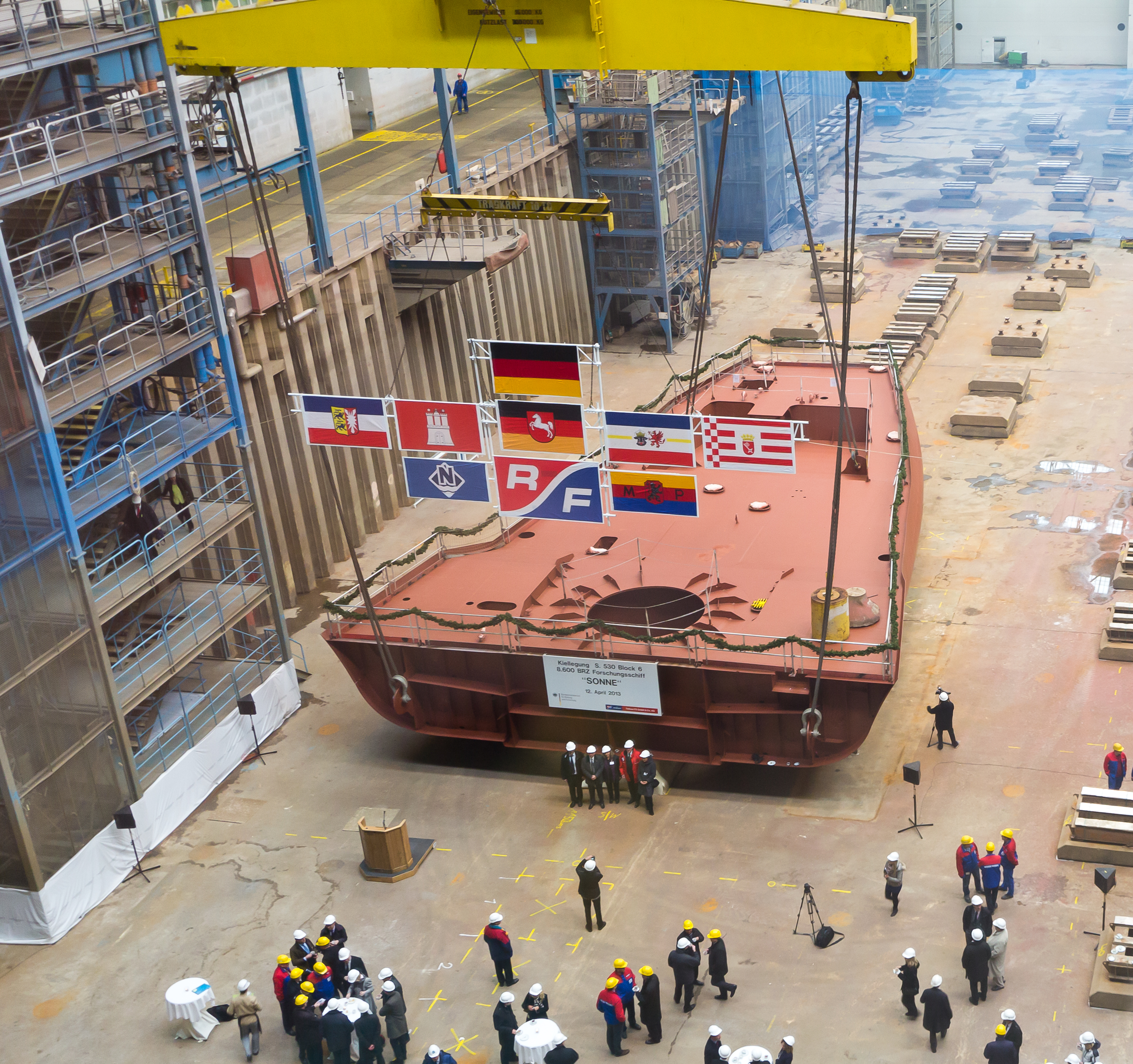 Meyer Werft Papenburg Foto: Feier zur Kiellegung des Forschungsschiffs „Sonne“